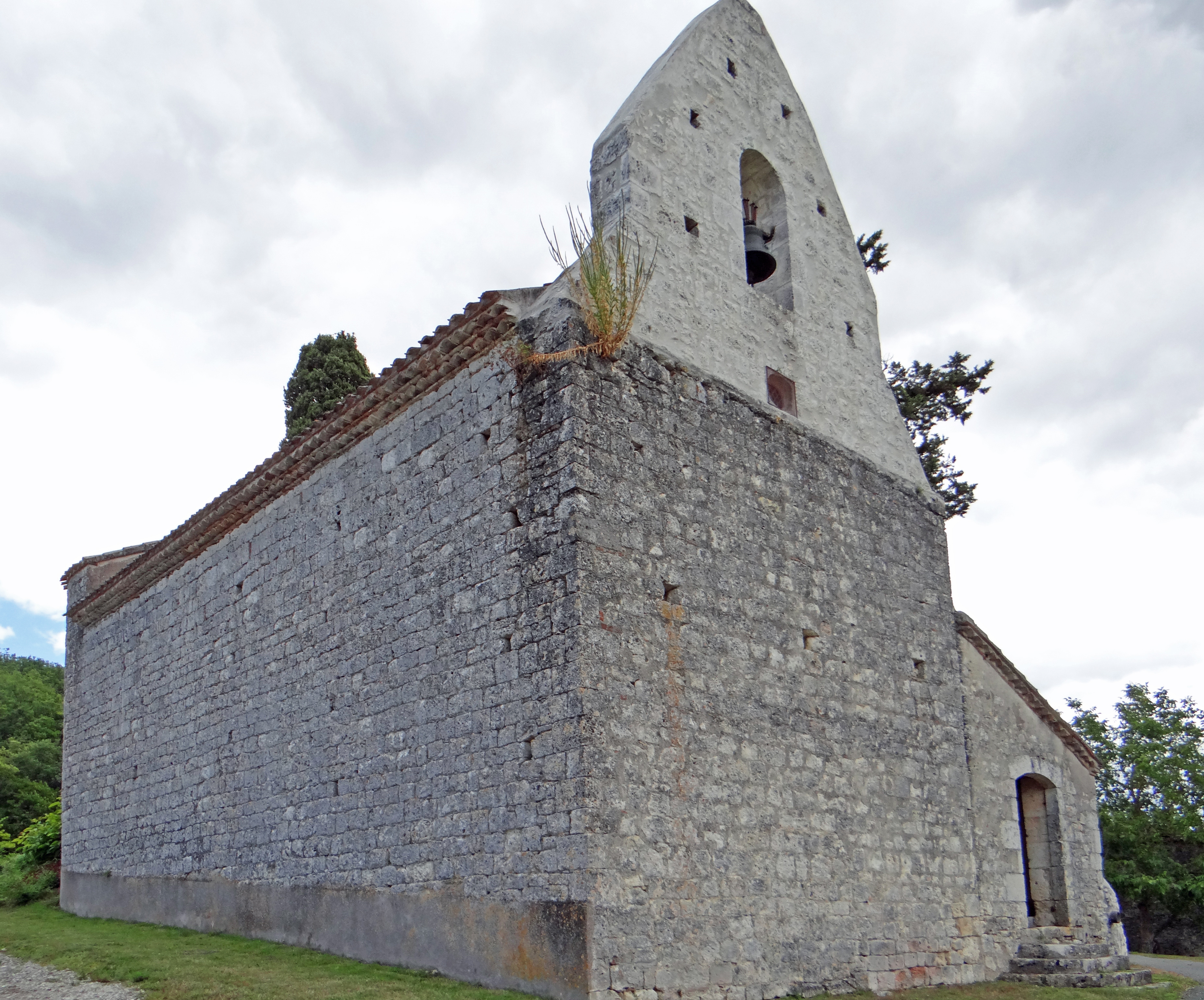 Massels - Église Saint-Pierre